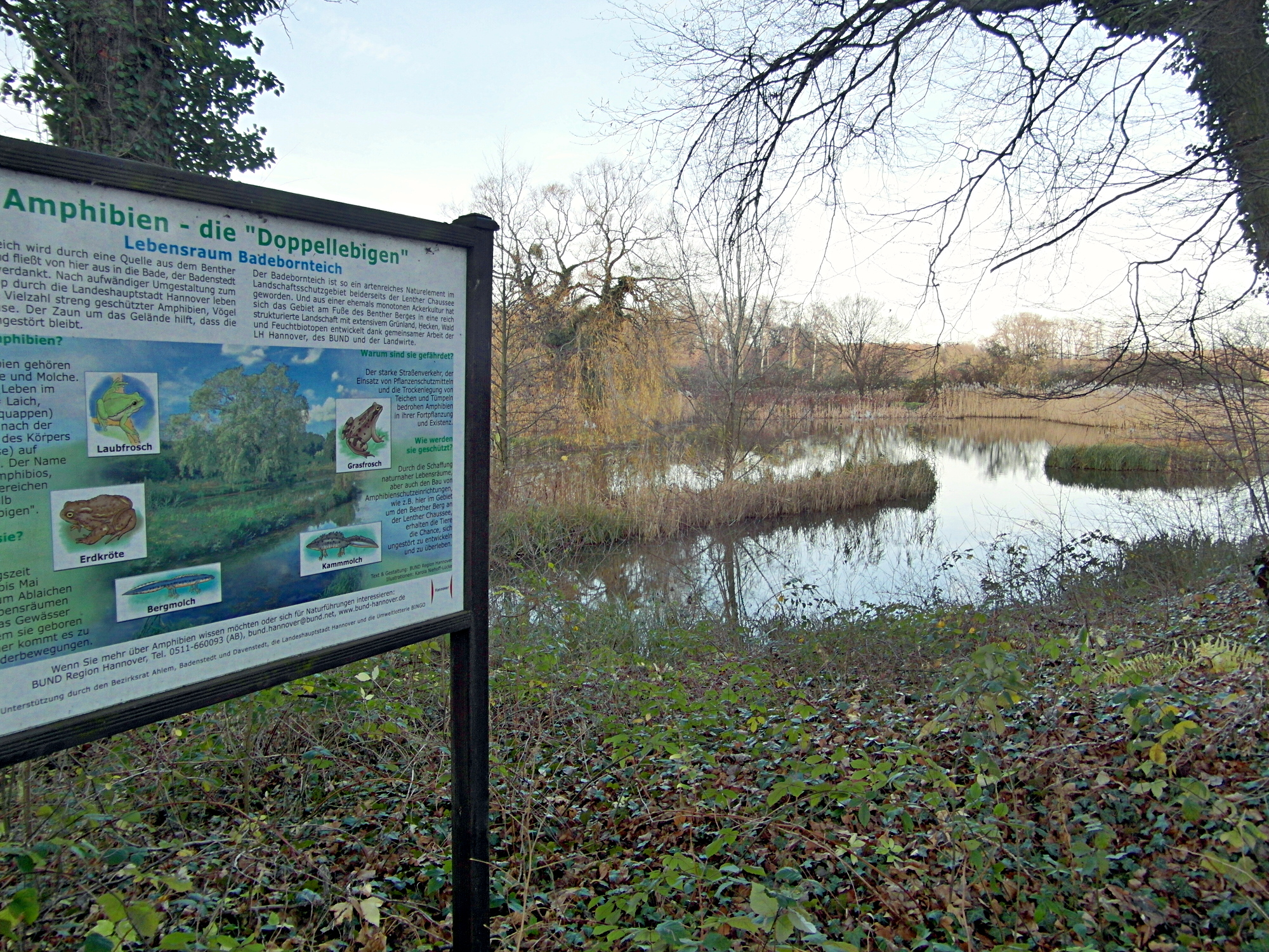 Blick durch eines des Sichtfenster in der Umzäunung des Biotops Badebornteich im Landschaftsschutzgebiet Benther-Berg-Vorland/Fössetal am Südwestrand des Stadtgebiets von Hannover. Die Informationstafel steht bereits innerhalb der Umzäunung.